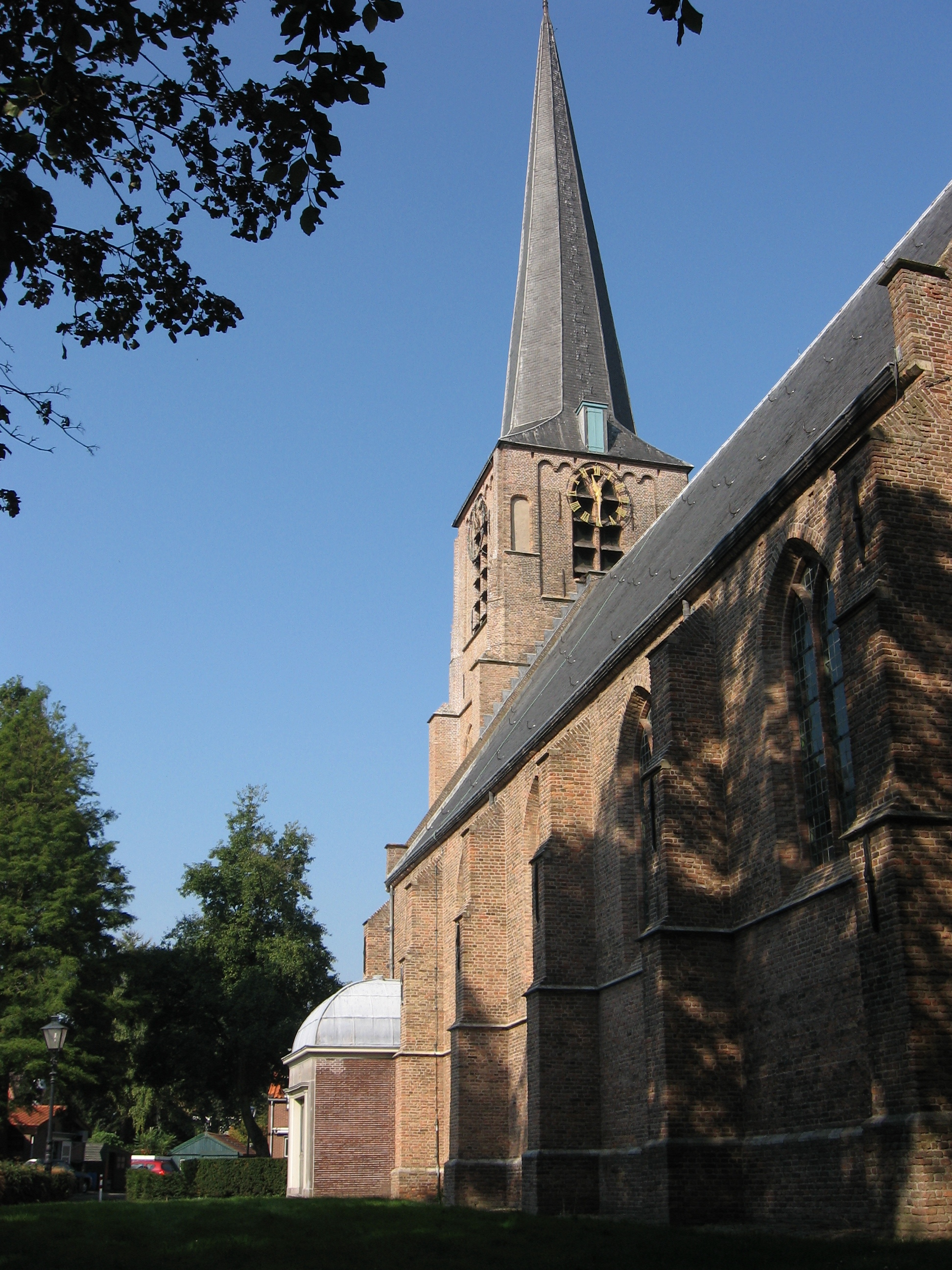 kerk, Mijnsheerenland